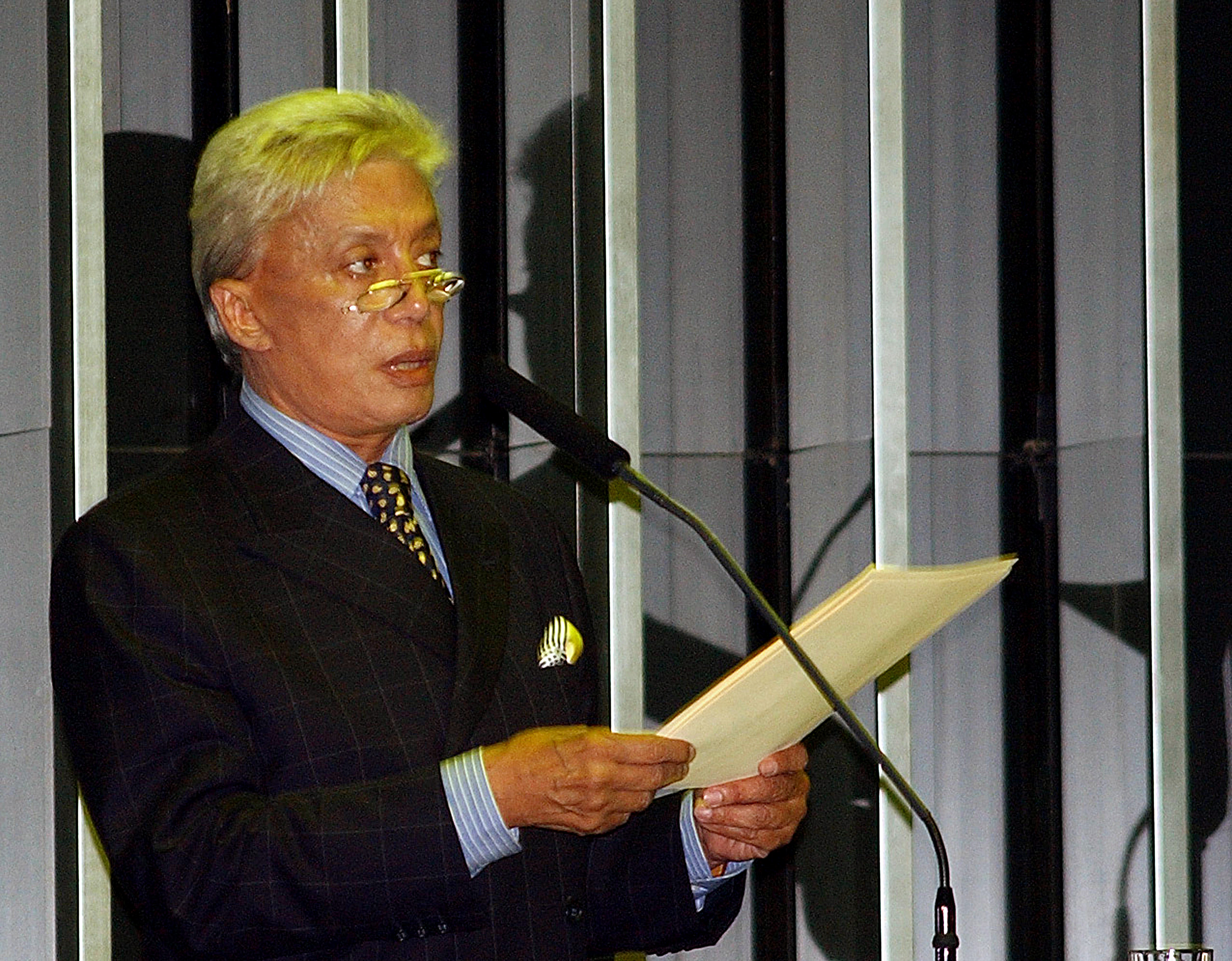 O estilista, apresentador de televisão e político brasileiro Clodovil Hernandes.